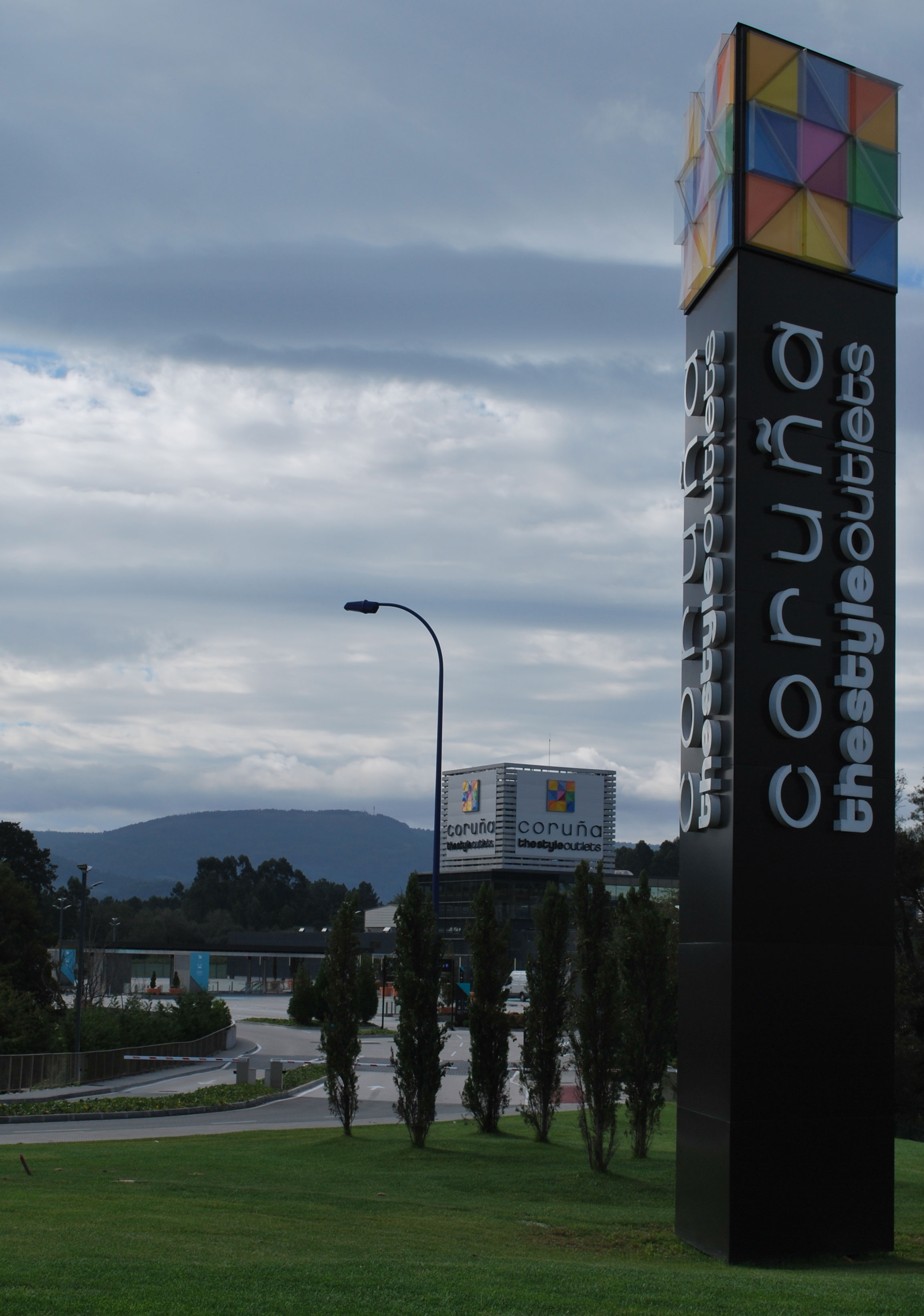 Acceso ao centro comercial dende a N-550